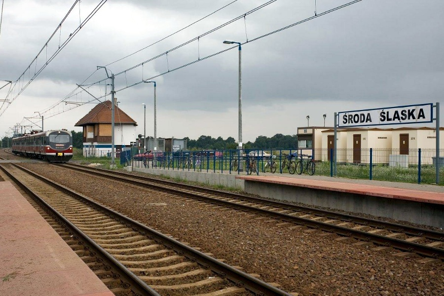 Wjeżdża pociąg jadący w kierunku Wrocławia. W tle nastawnia zabita dechami (z płyt OSB:).